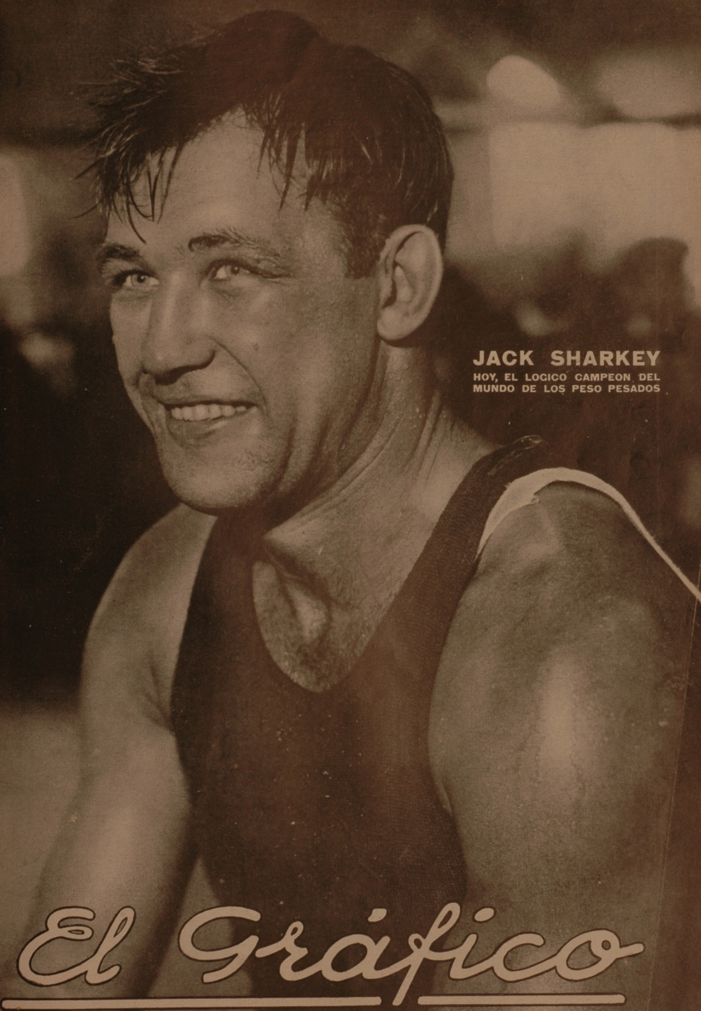 El Grafico del 08 de Marzo de 1930. Edicion 556